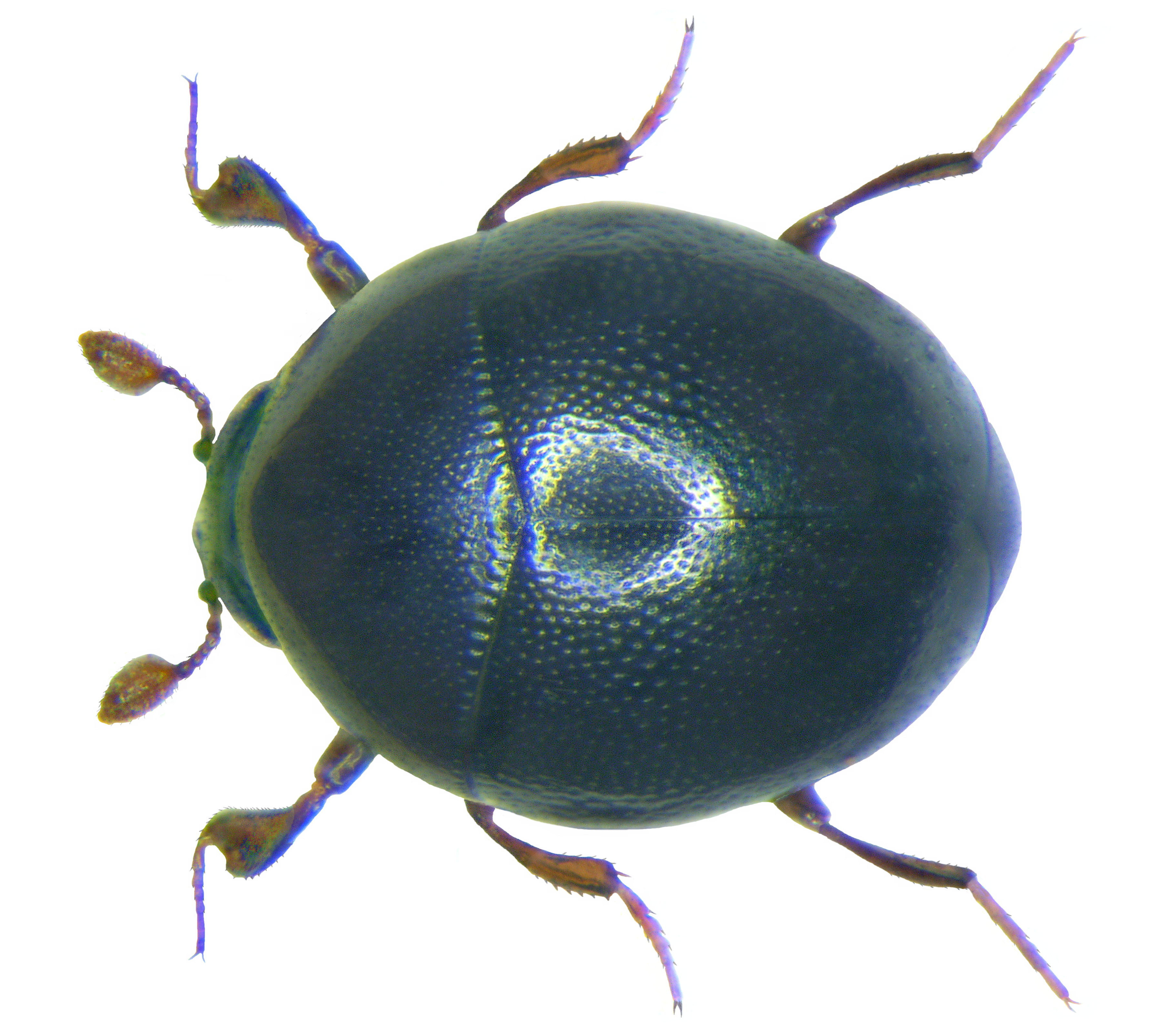 Familie: Histeridae Grösse: 1,5 mm Fundort: Kenia Tsavo National Park leg. U.Schmidt, 1991; det. Mazur, 2006 Foto: U.Schmidt, 2008